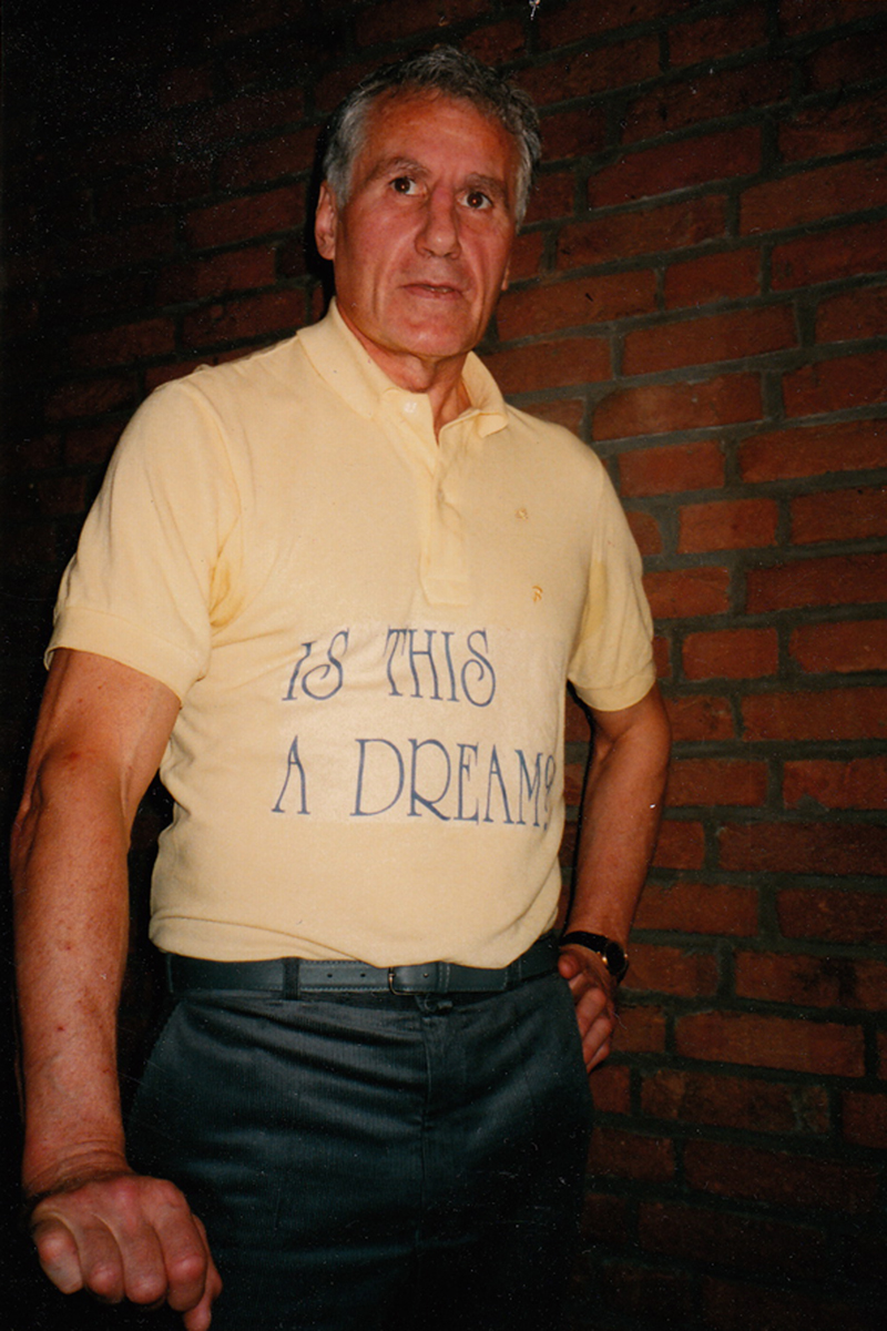 Hochschullehrer Prof. Dr. Paul Tholey, ca. 1995.